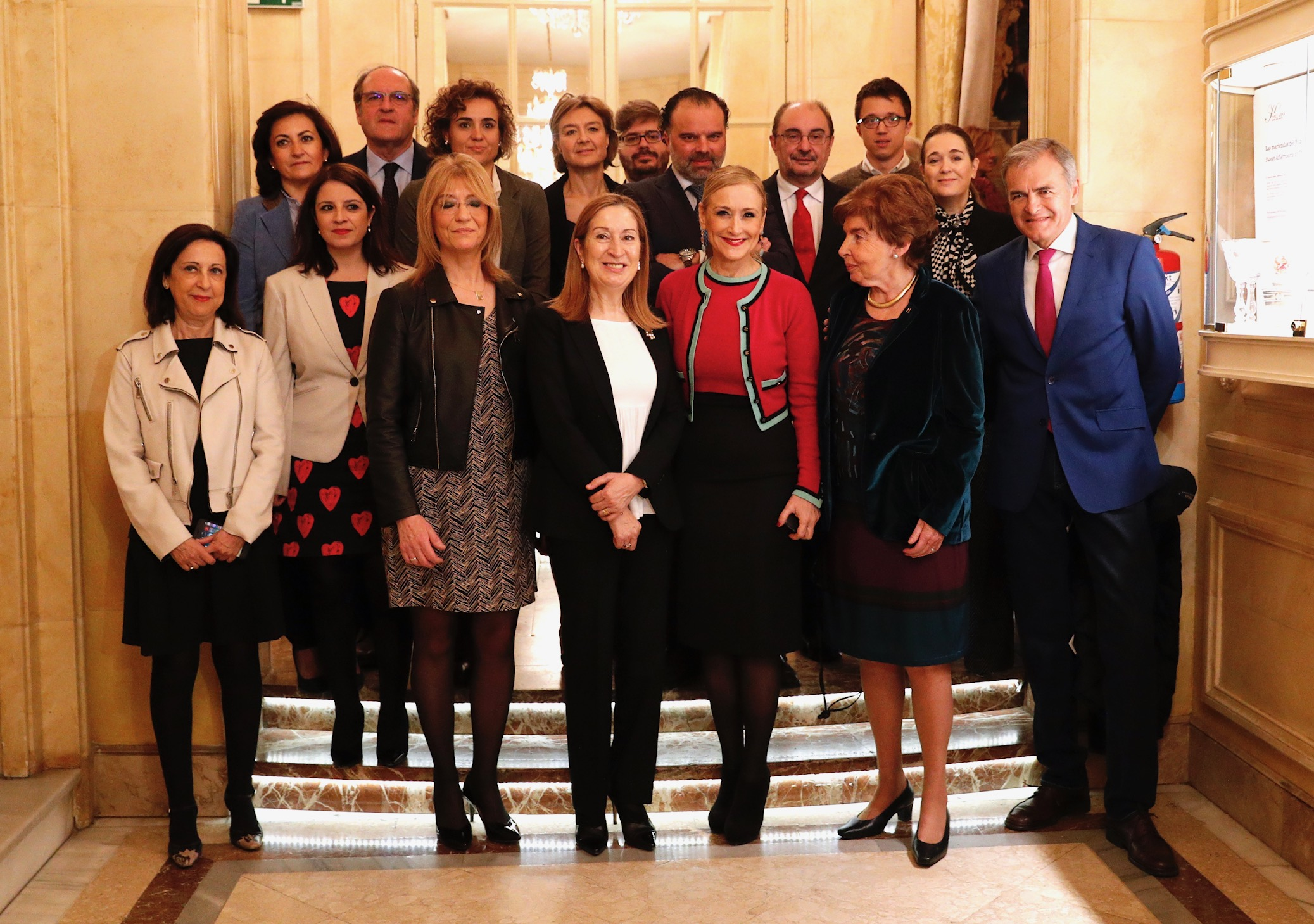 Con la presidenta del Congreso, Ana Pastor Julián, escuchando en el desayuno del Nueva Economía Fórum a la directora de 20minutos.es, Encarna Samitier, hablar sobre los retos del periodismo “en tiempos de ruido”.